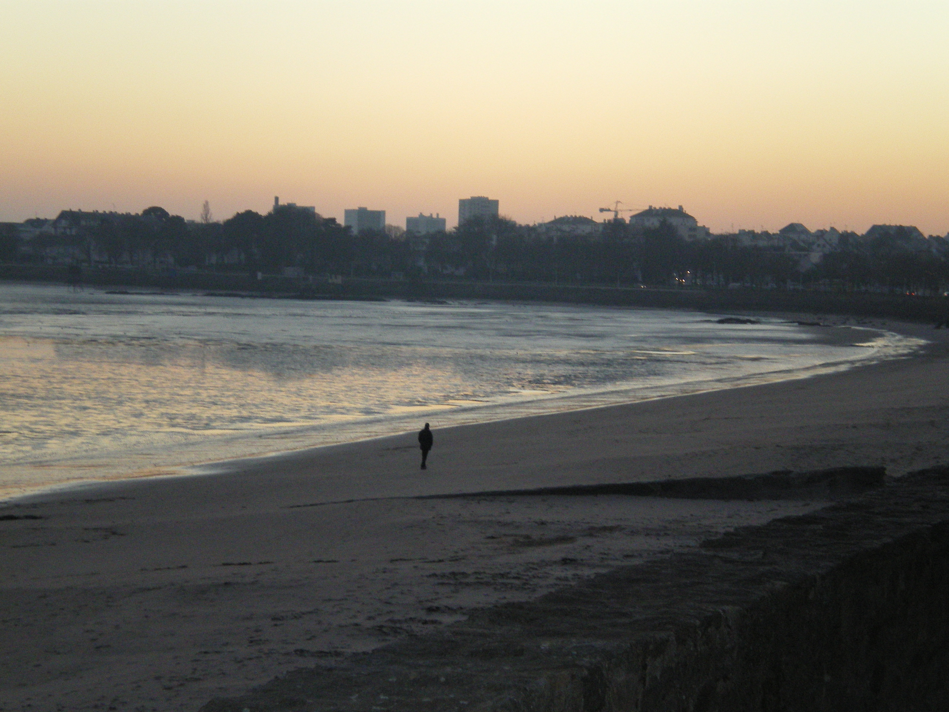 Front de Mer et Baie de Saint-Nazaire